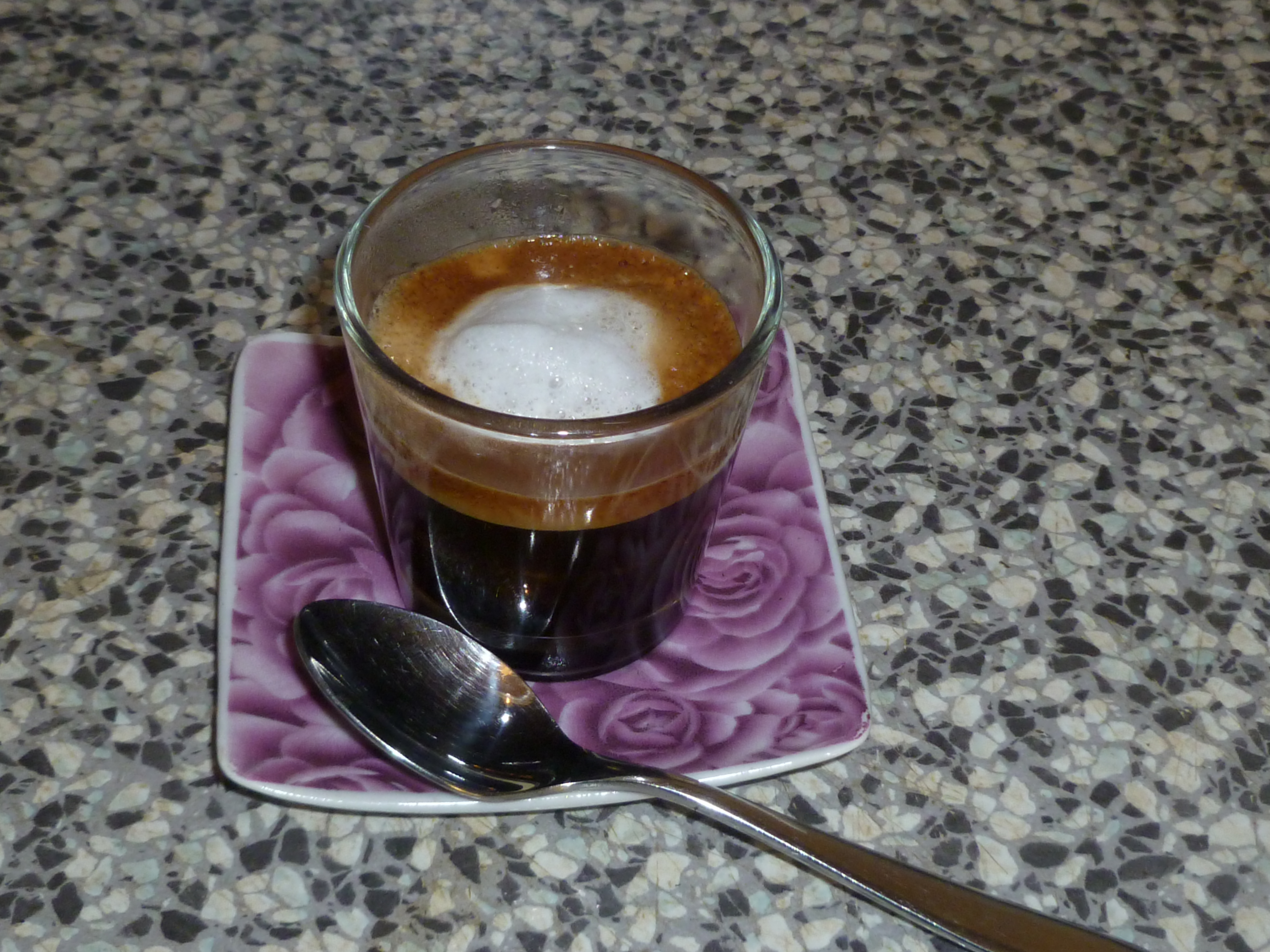 Tipico caffè espresso con aggiunta di latte e schiuma